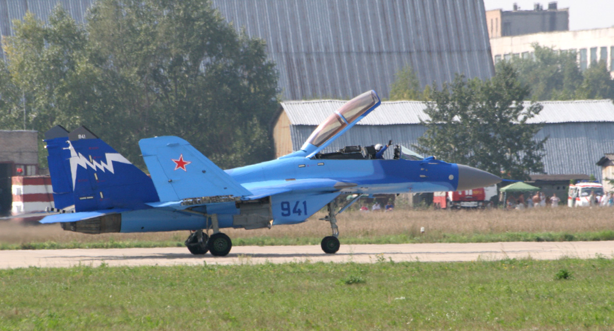 Самолёт МиГ-29КУБ на МАКС-2007